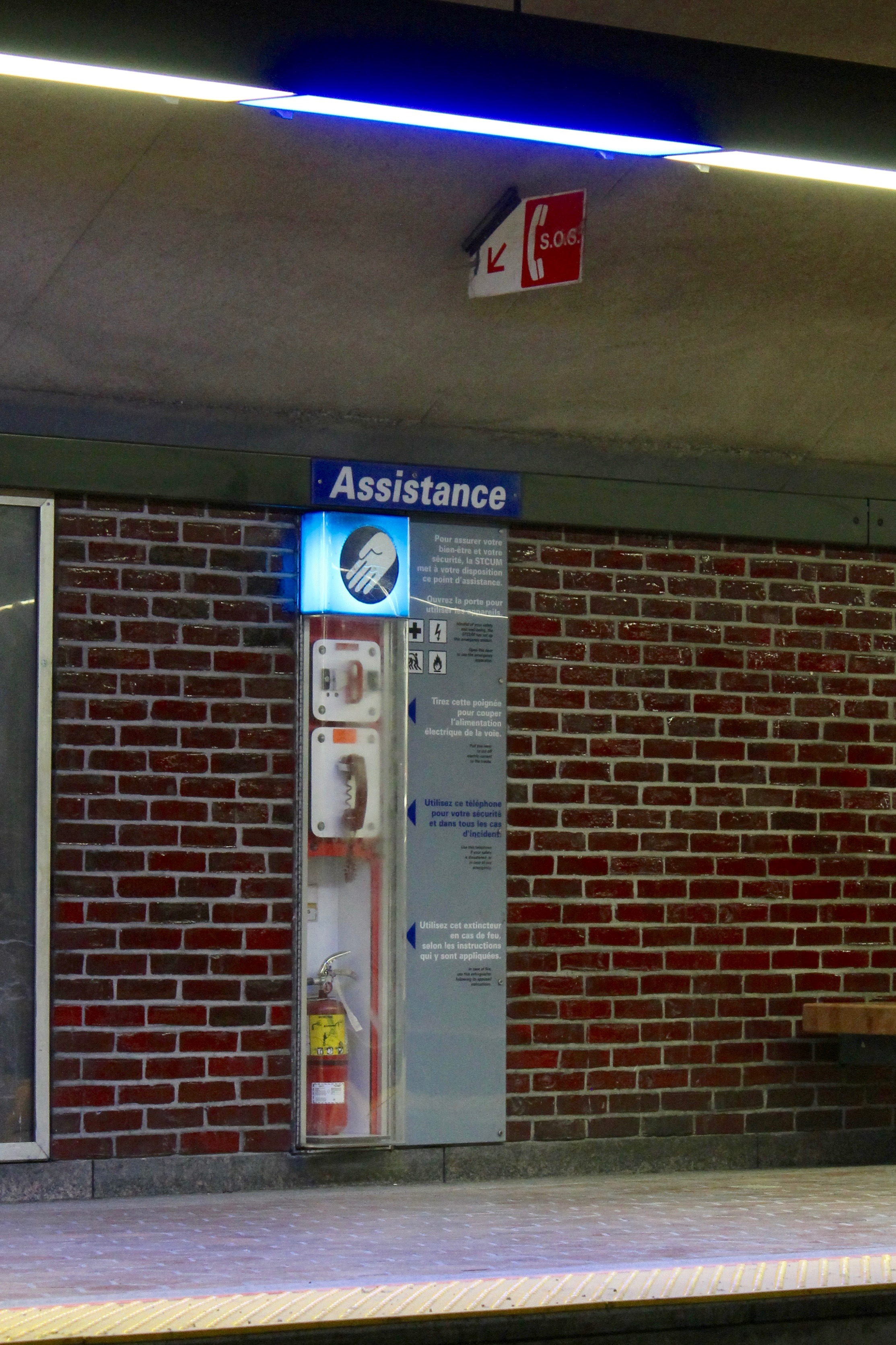 Un point d'assistance du métro de Montréal sous sa lampe bleue, station Georges-Vanier.